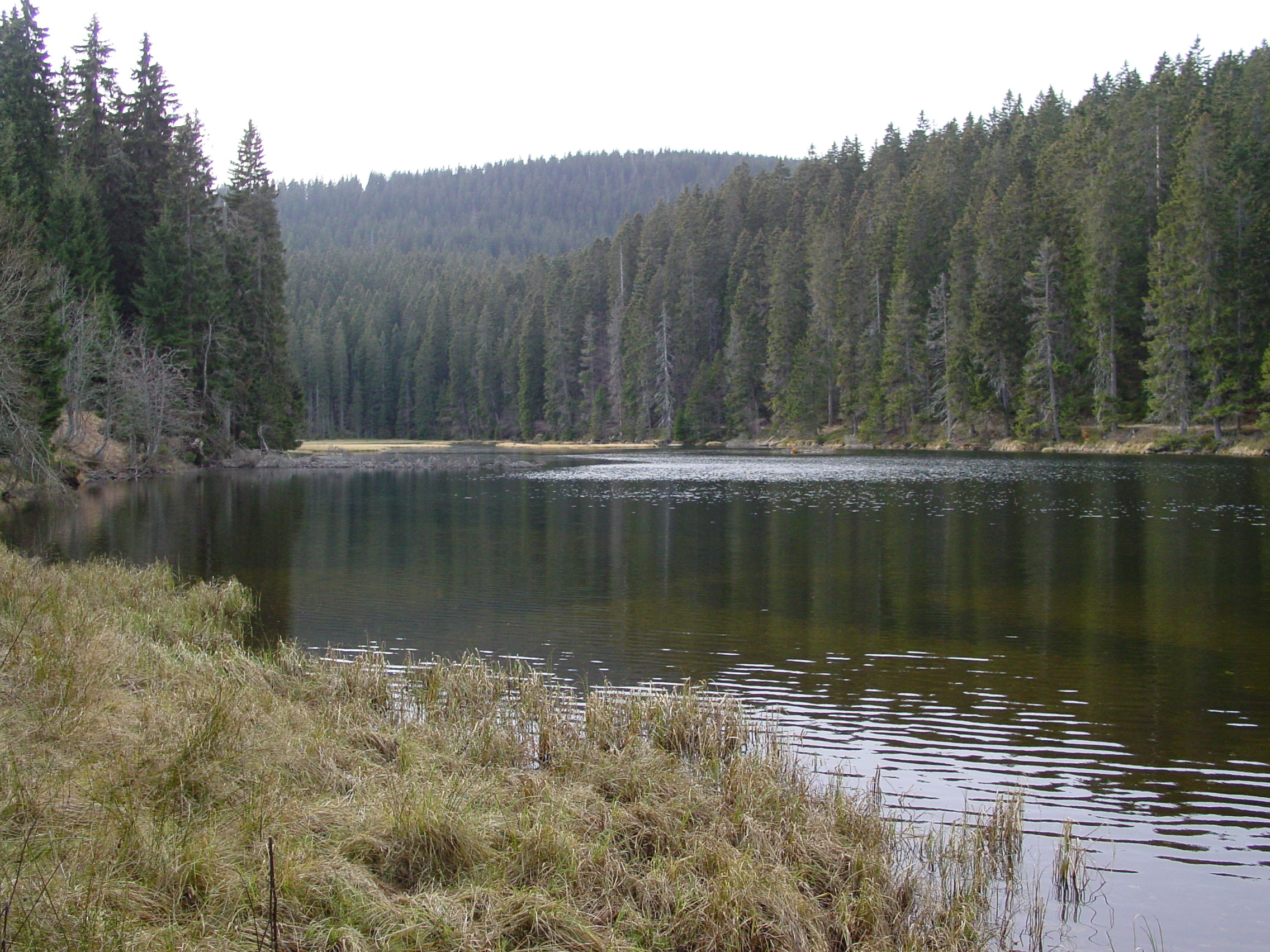 Jezero Laka, v pozadí hřeben Plesné (1337 m)